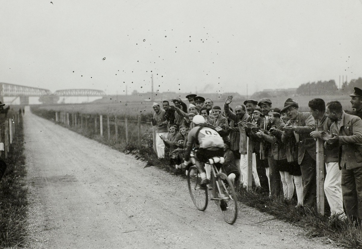 Spaarnestad Photo/SFA006002540 Sport, Olympische Spelen Amsterdam, 1928. De Italiaanse wielrenner Michele Orecchia tijdens de wegwedstrijd, aangemoedigd door enthousiaste omstanders.